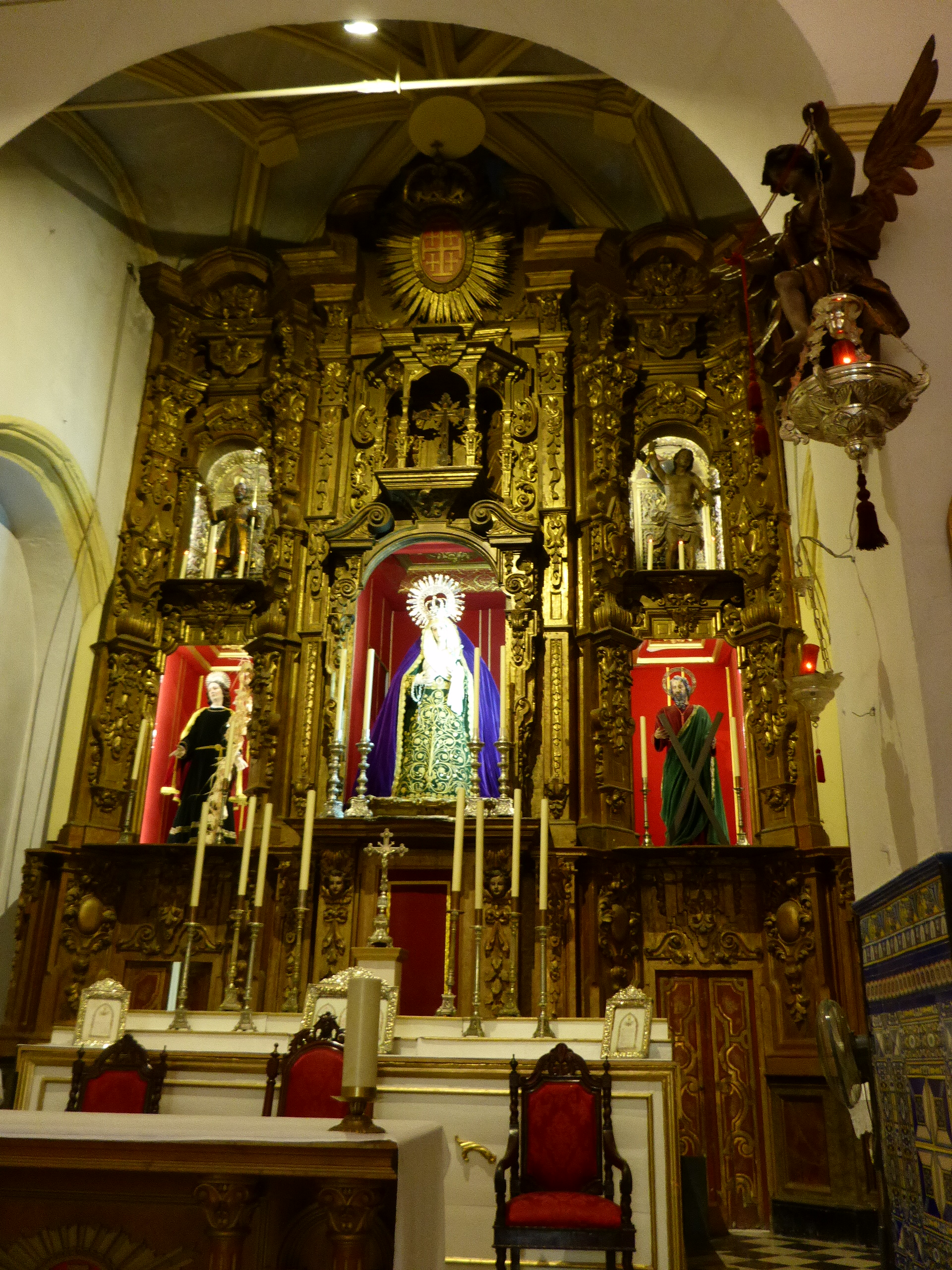 Capilla de San Juan de Letrán (Jerez de la Frontera).